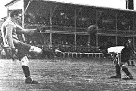 Camp del carrer Indústria. Situat entre París (Indústria), Villarroel, Londres (Coello) i Urgell. Capacitat: 6000 espectadors. Vista de la tribuna de dos pisos.